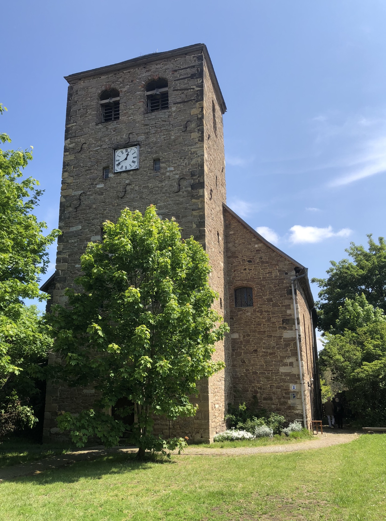 Andreaskirche in Thale